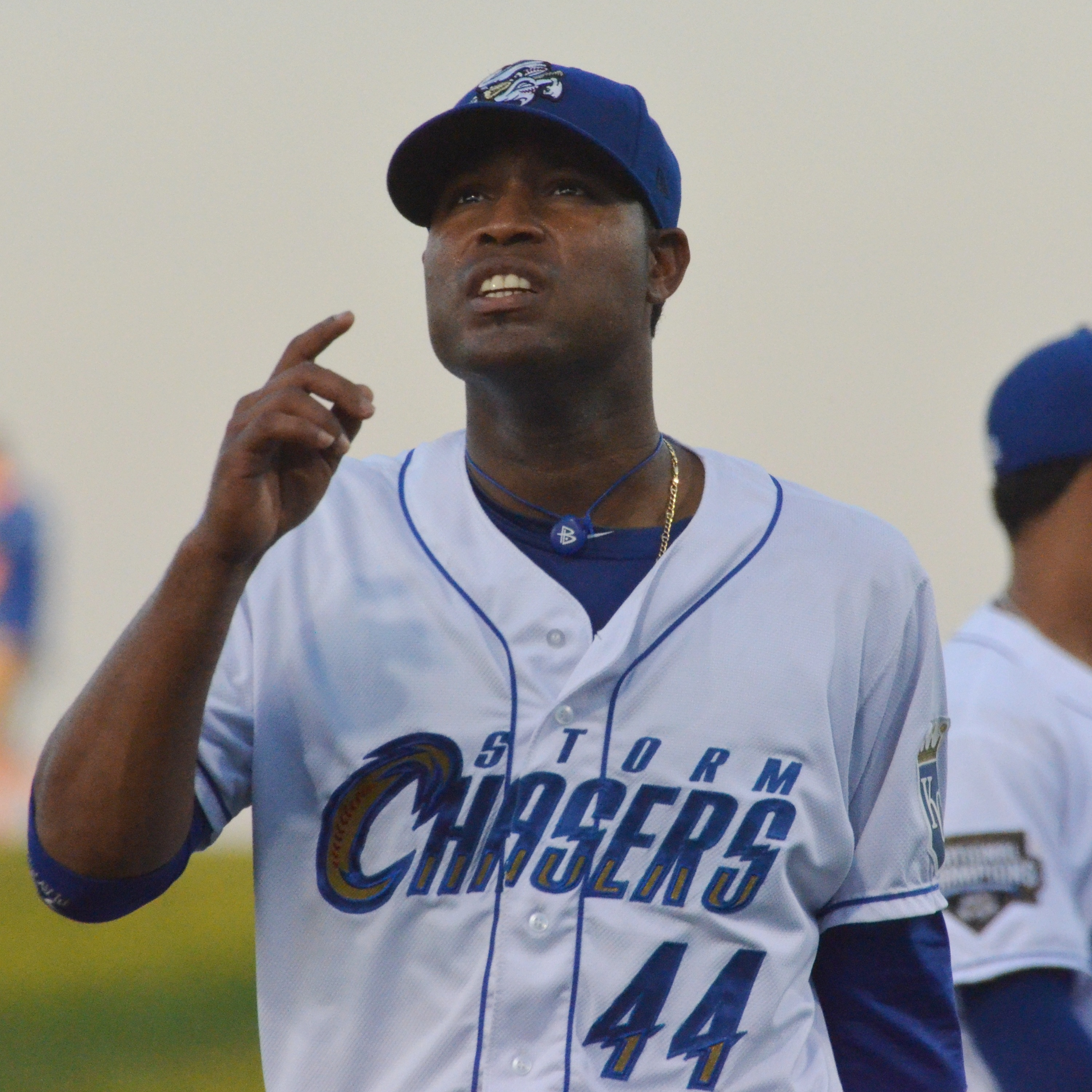 Sugar Ray Marimón